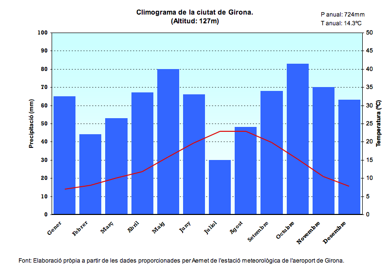 Climograma (diagrama ombrotèrmic) de la ciutat de Girona, amb les dades presentades de la manera habitaual.